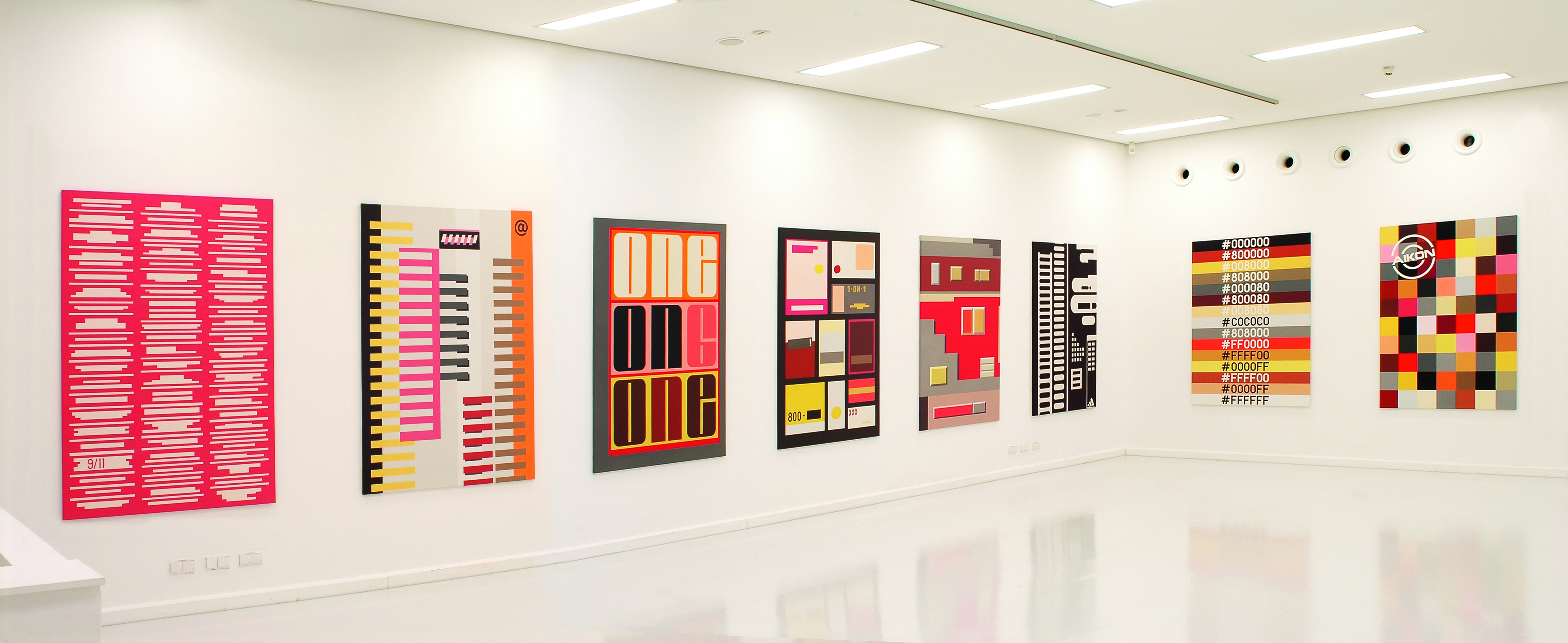 Georg Salner, Einzelausstellung "multiple identität", Tiroler Landesmuseum Ferdinandeum Innsbruck 2012/2013Ausstellungsdetail: acht Bilder aus der 36-teiligen Serie von Ölbildern typo.log 36 EXP, à 180 x 130 cm.